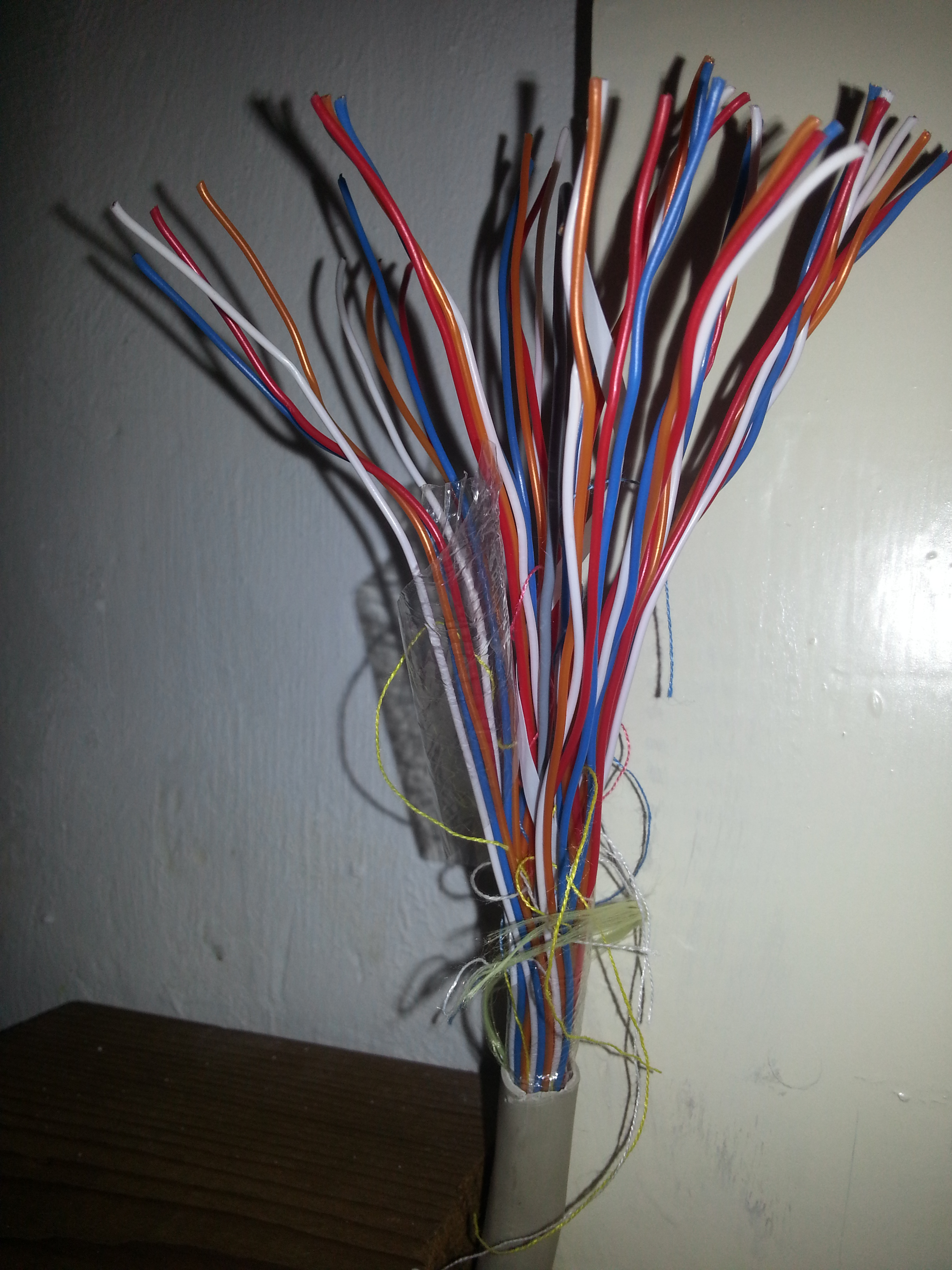 Norm 88 kabel 10x4x0,5+0,8 mm